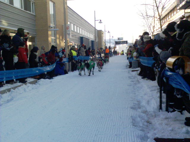 Finnmarksløpet, 2006 eller 2007